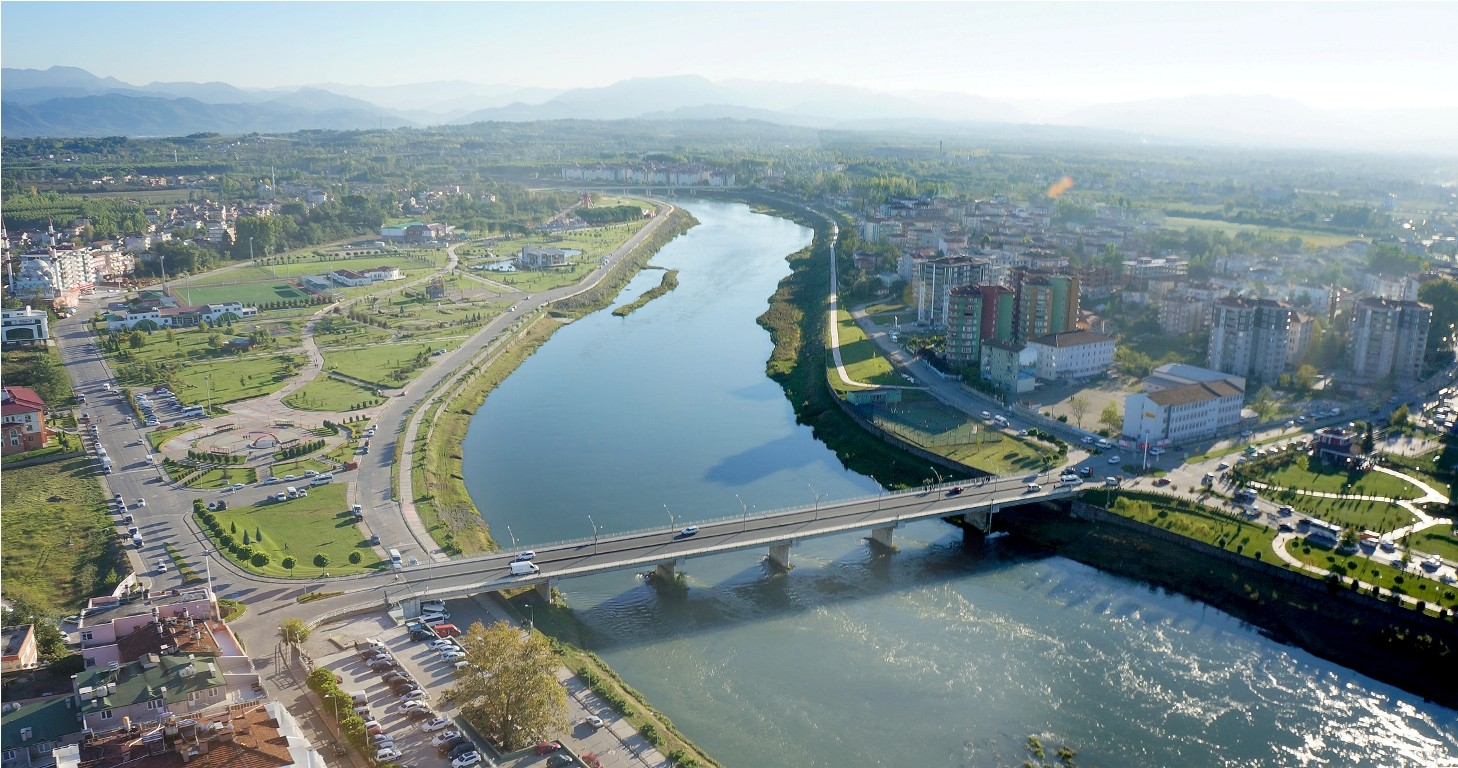 Çarşamba Belediyesi sitesinden alınmıştır.